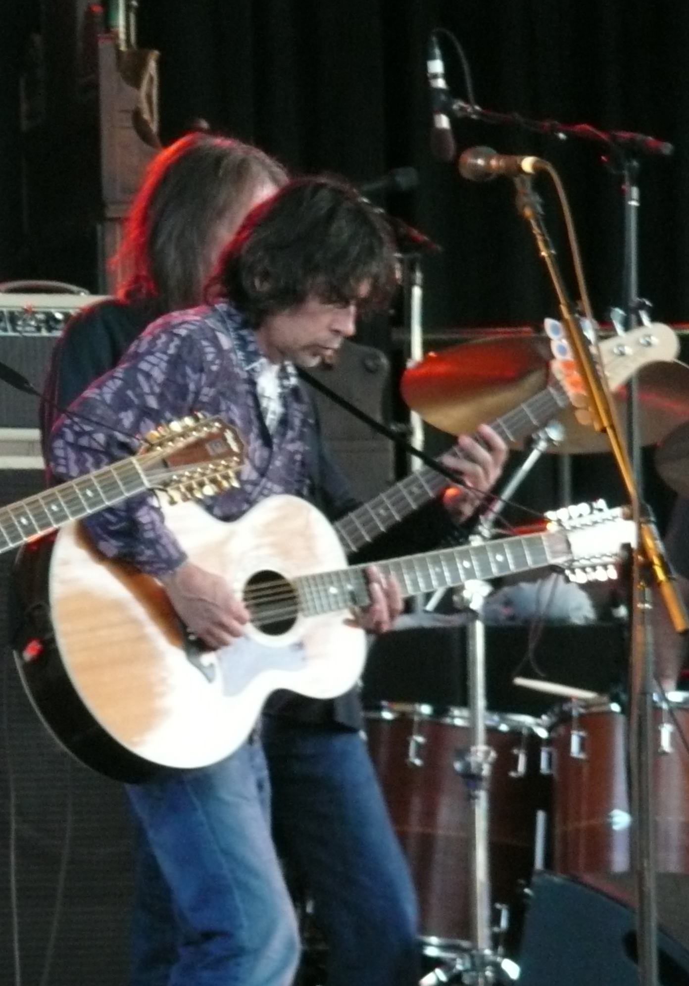 Der Gitarrist, Pianospieler und Sänger Anthony Crawford beim Konzert von Neil Young am 19. Juni 2009 am Kölner Tanzbrunnen